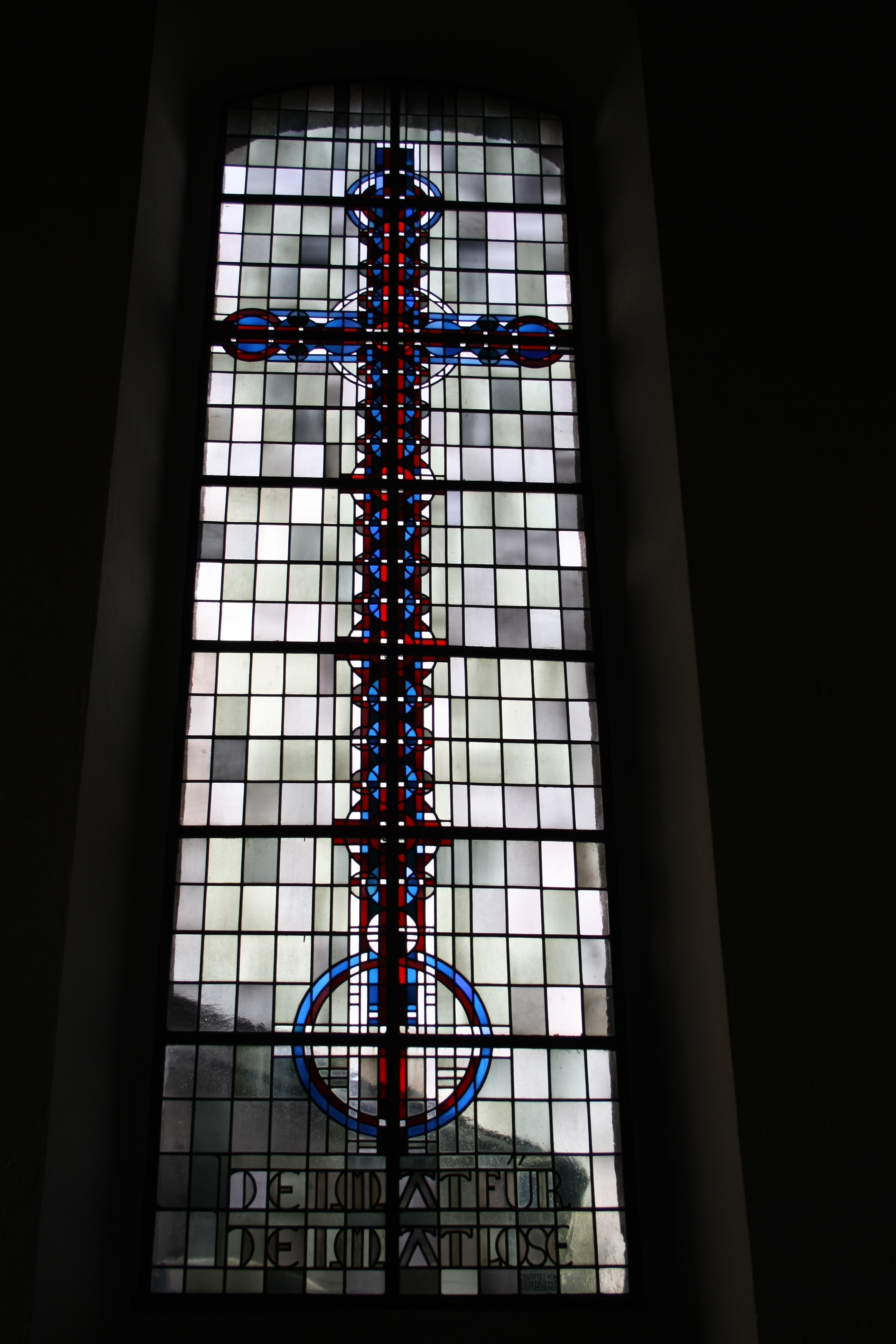 Bleiglasfenster in der evangelischen Kirche in Linnich, Darstellung: Fenster der Heimatvertriebenen, Herstellung: Glasmalerei Oidtmann